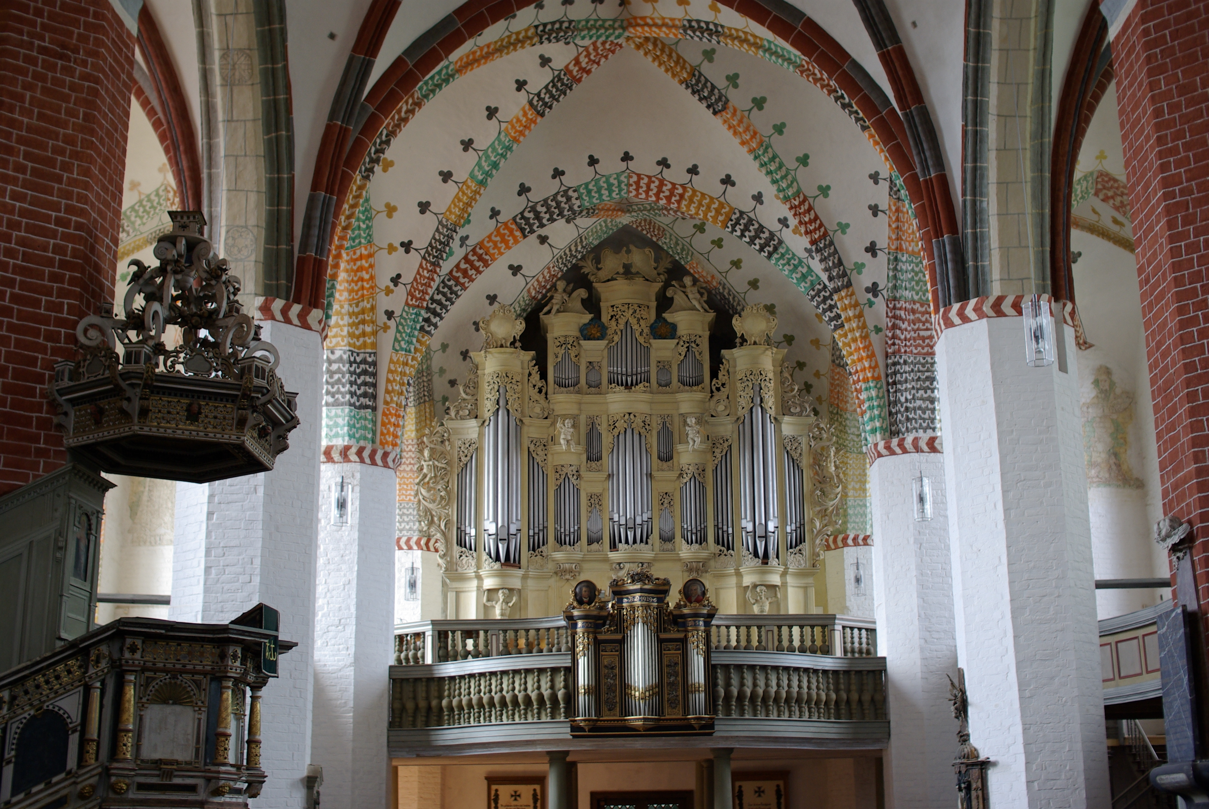 Jüterbog in Brandenburg. Die Orgel der Kirche wurde im 18. Jahrhundert erbaut.